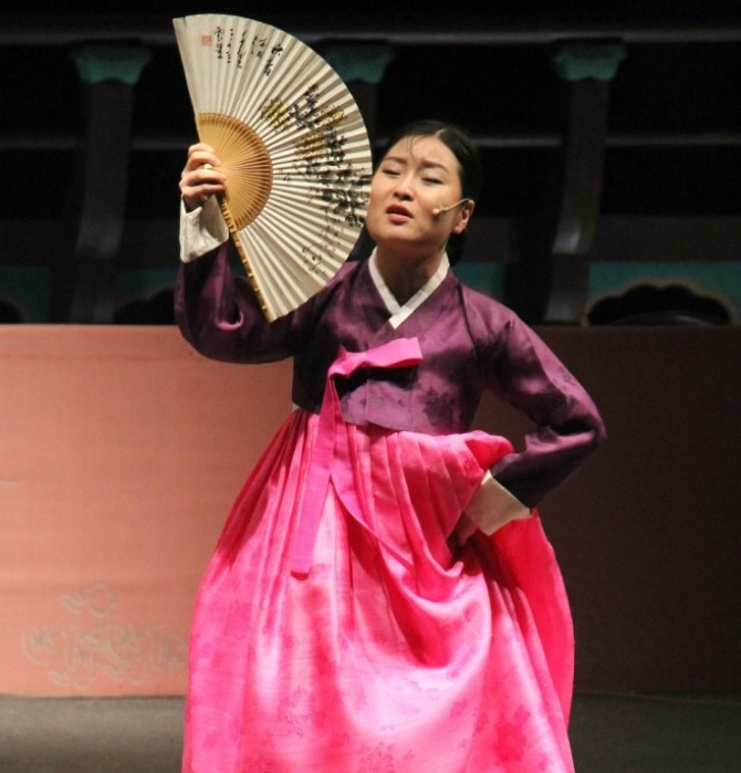 심청가 눈대목